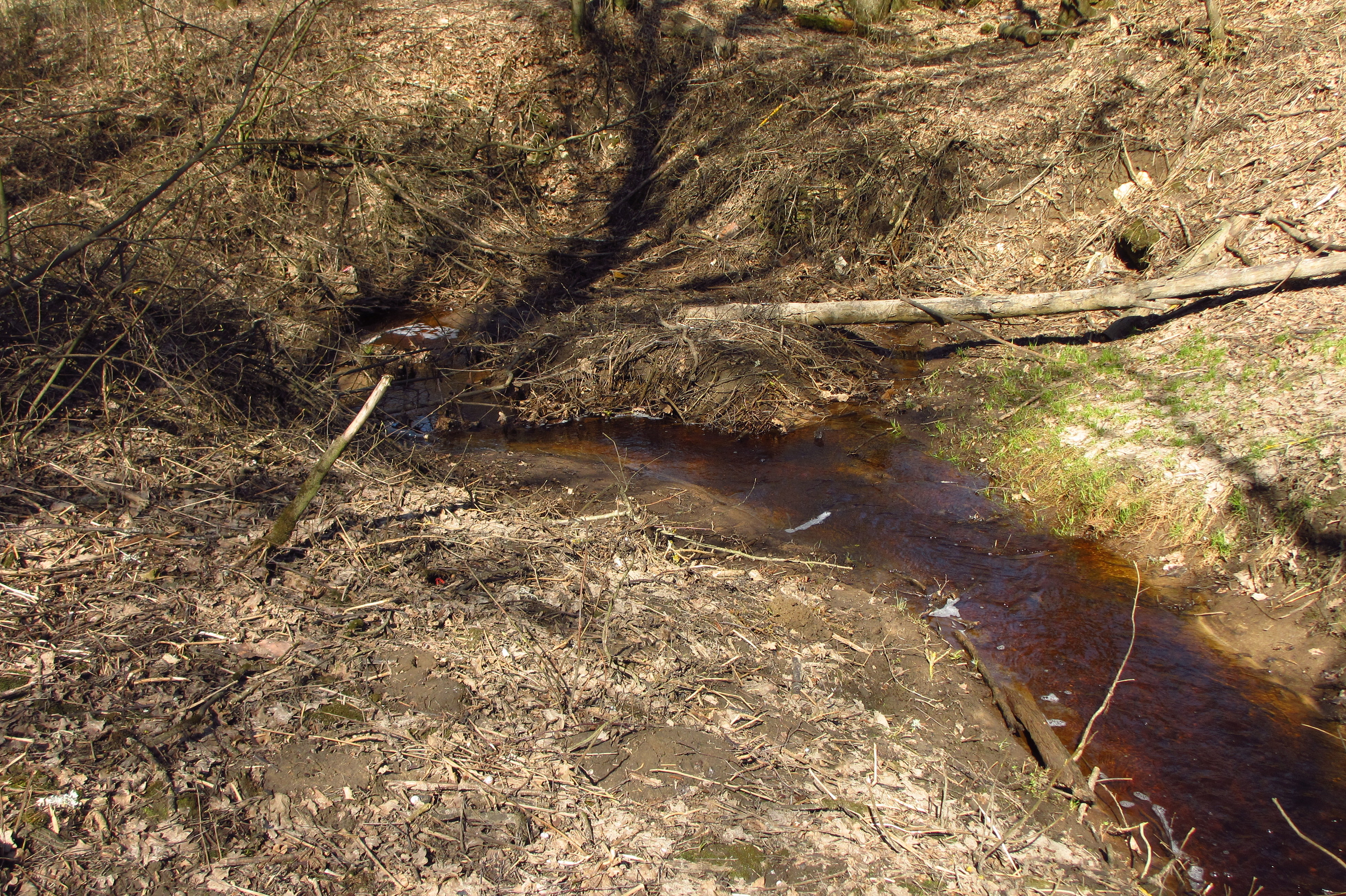 Aandu karstiala